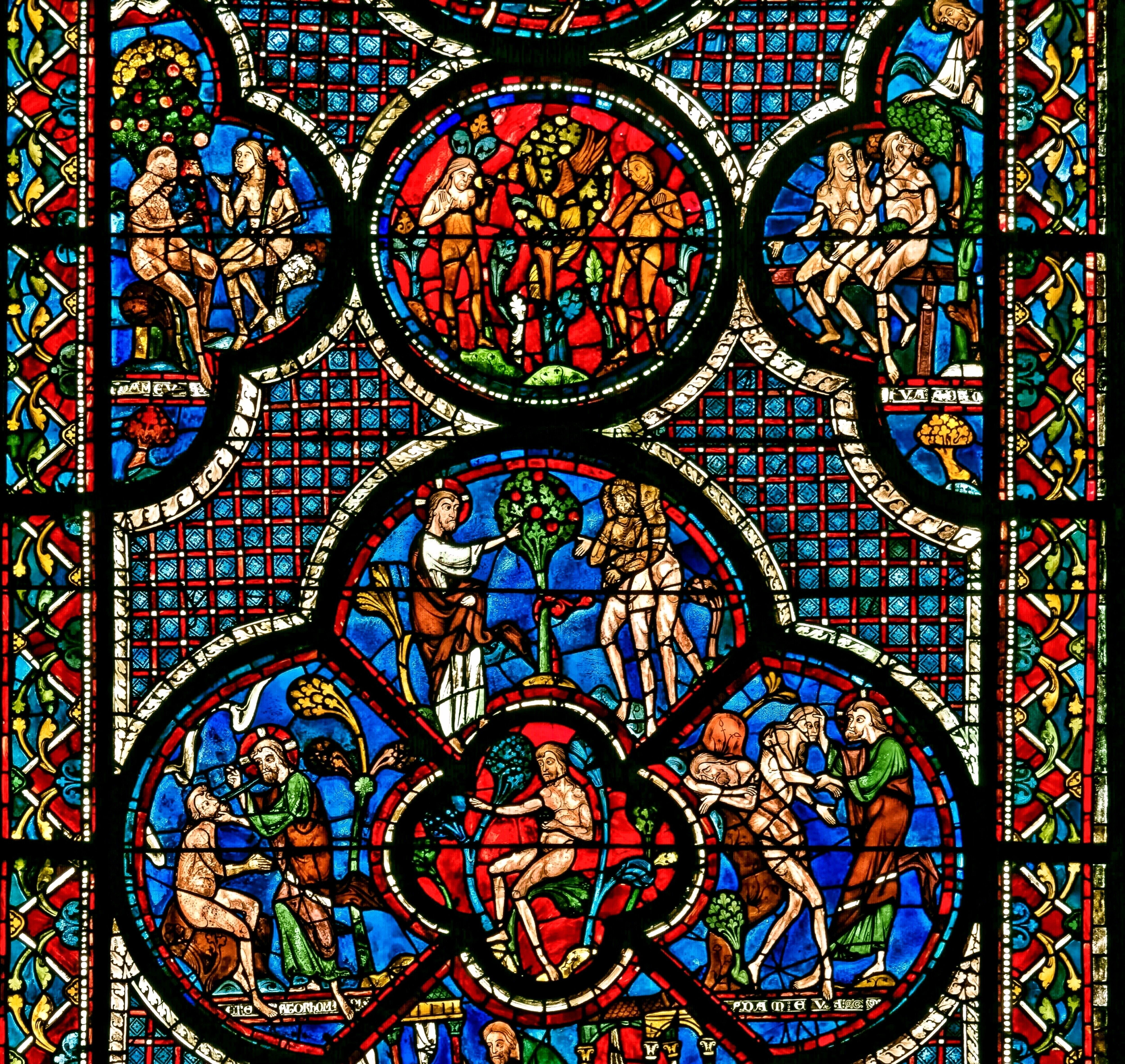 Geschichte von Adam und Eva: von der Erschaffung Adams und Evas bis zum Sündenfall.